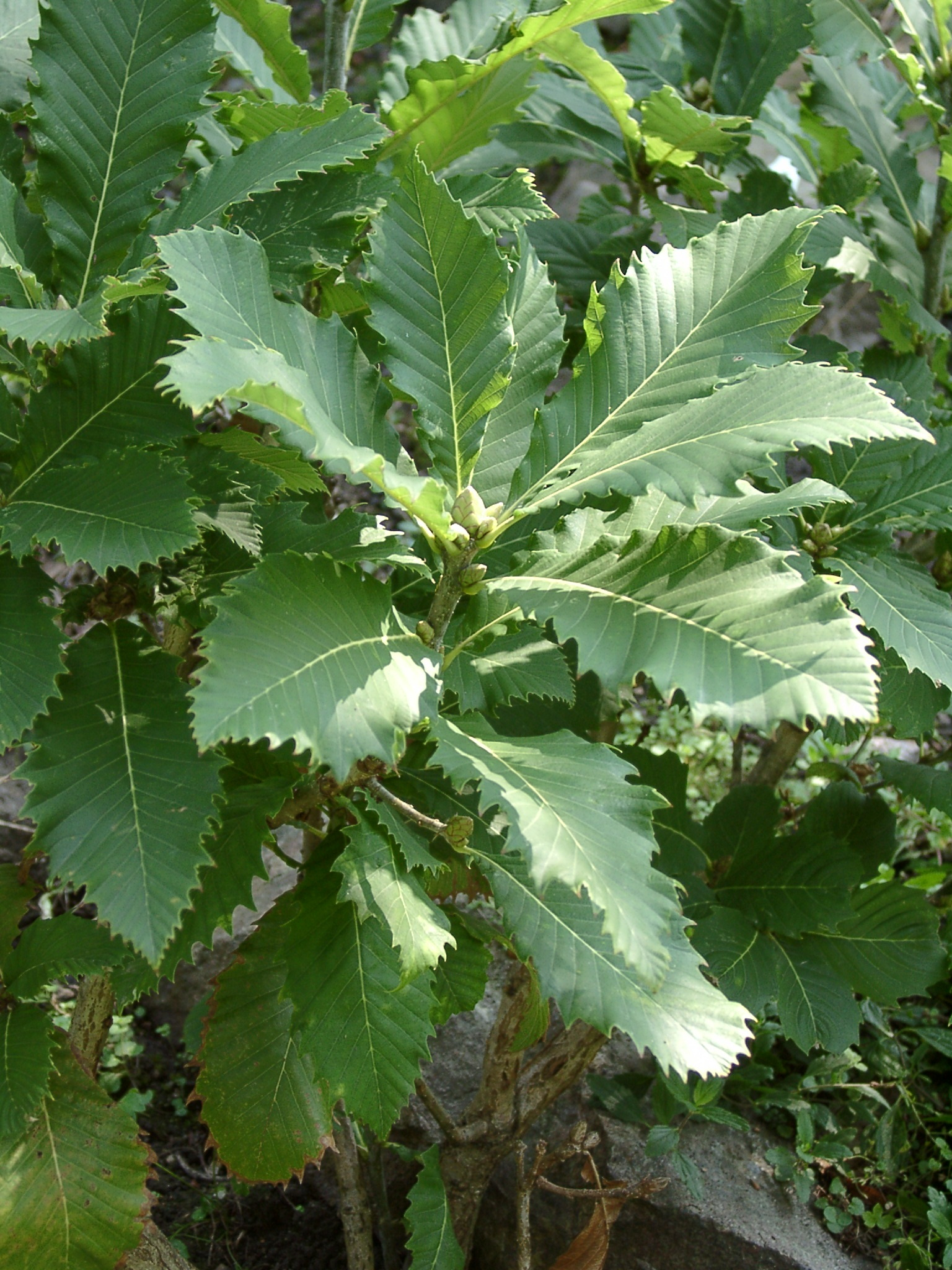 Quercus pontica, Botanischer Garten, Dresden